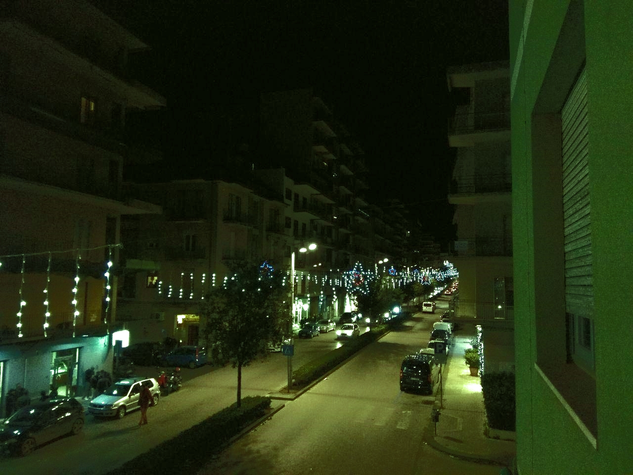 Vista notturna di Viale Mario Milazzo, a Caltagirone (CT)